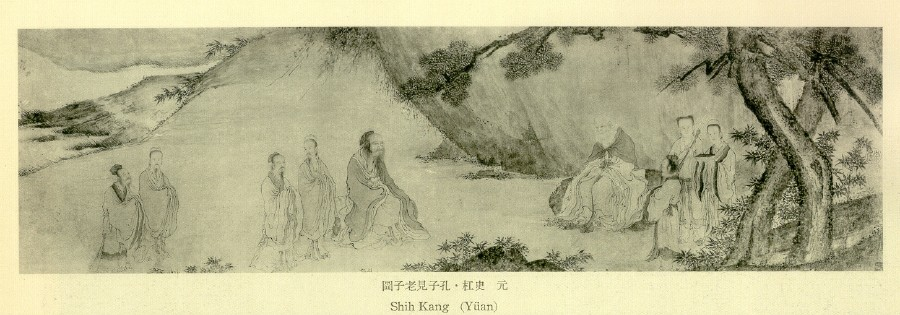 Konfuzius trifft Laozi Confucius meets Laozi